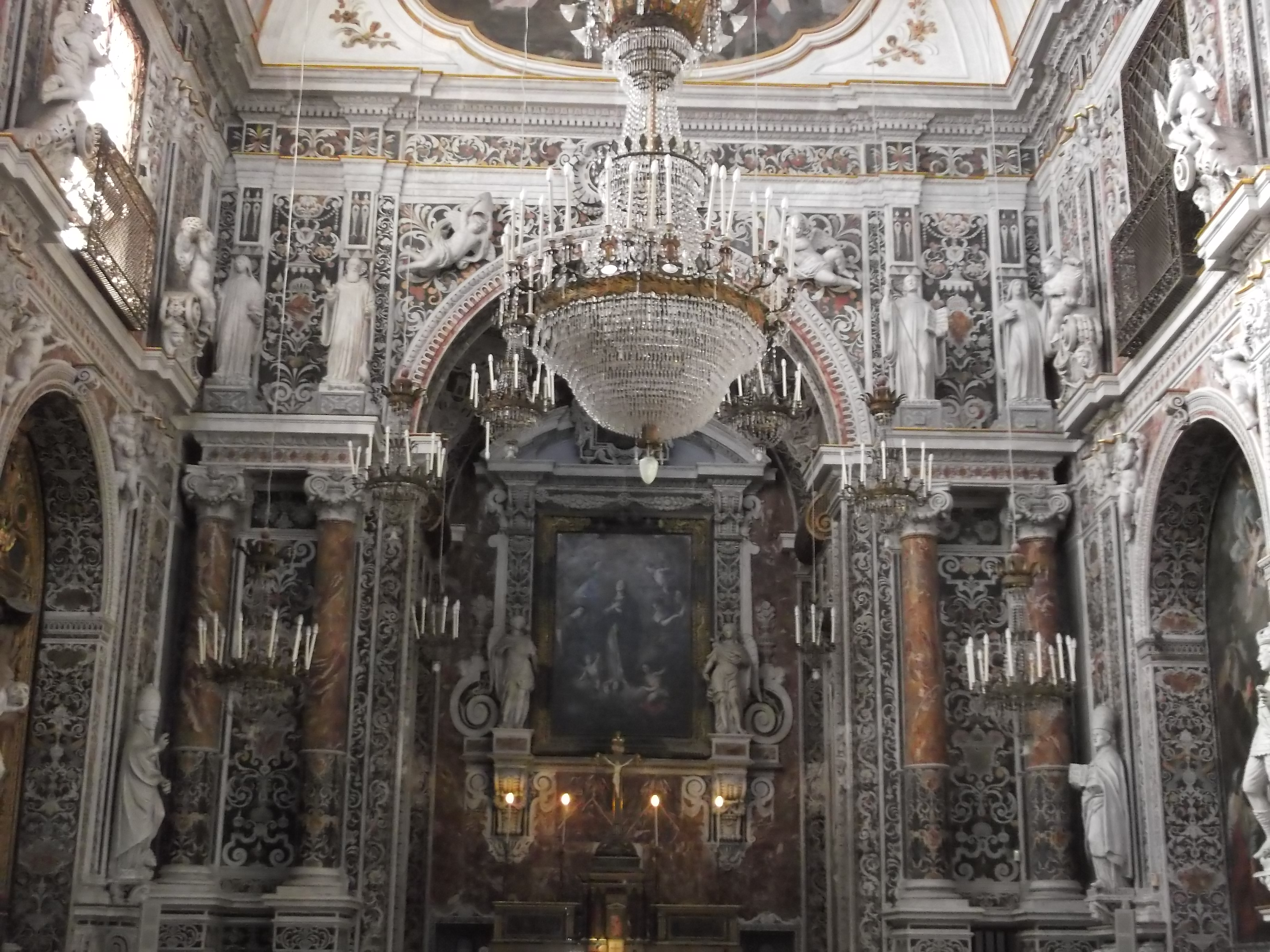 Altare